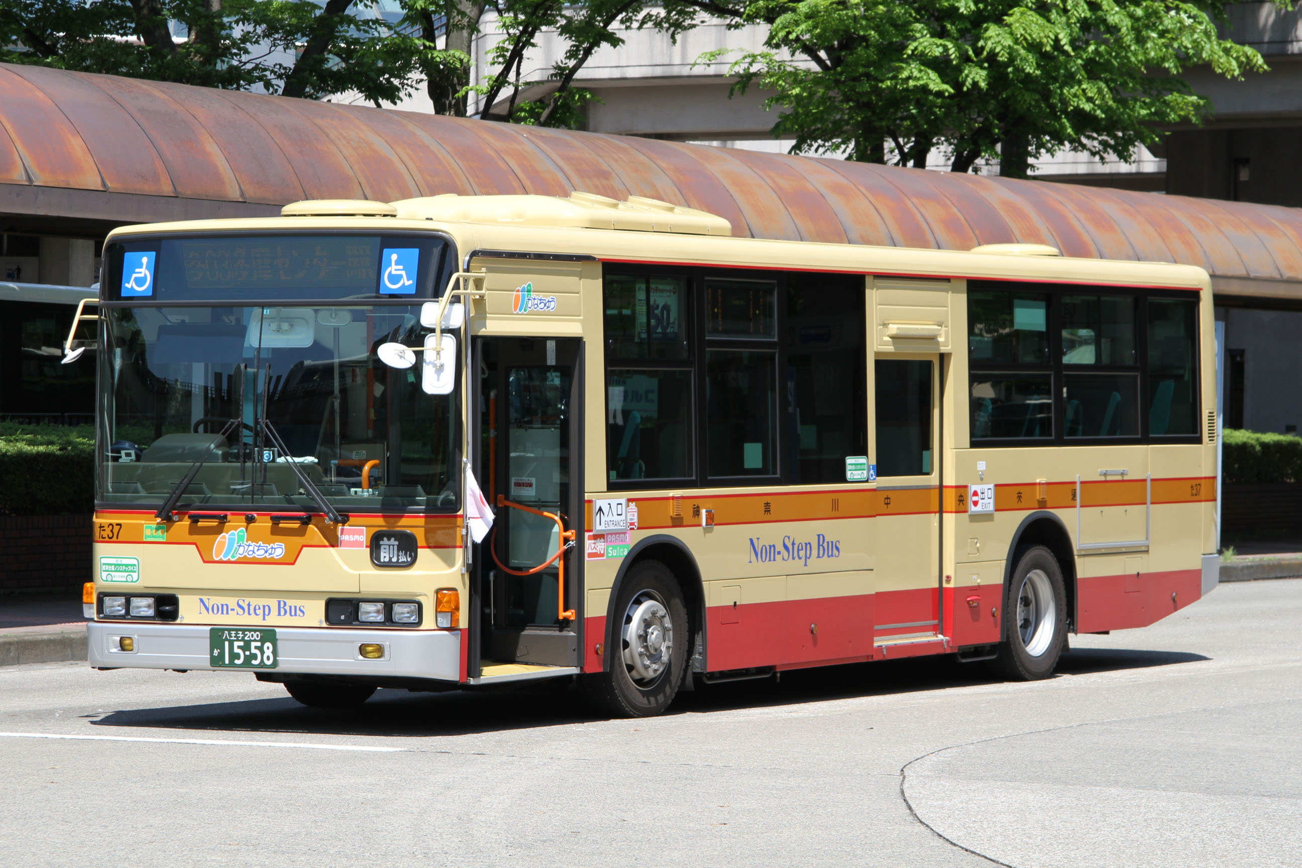 Kanagawa Chuo Kotsu car 神奈川中央交通の車両